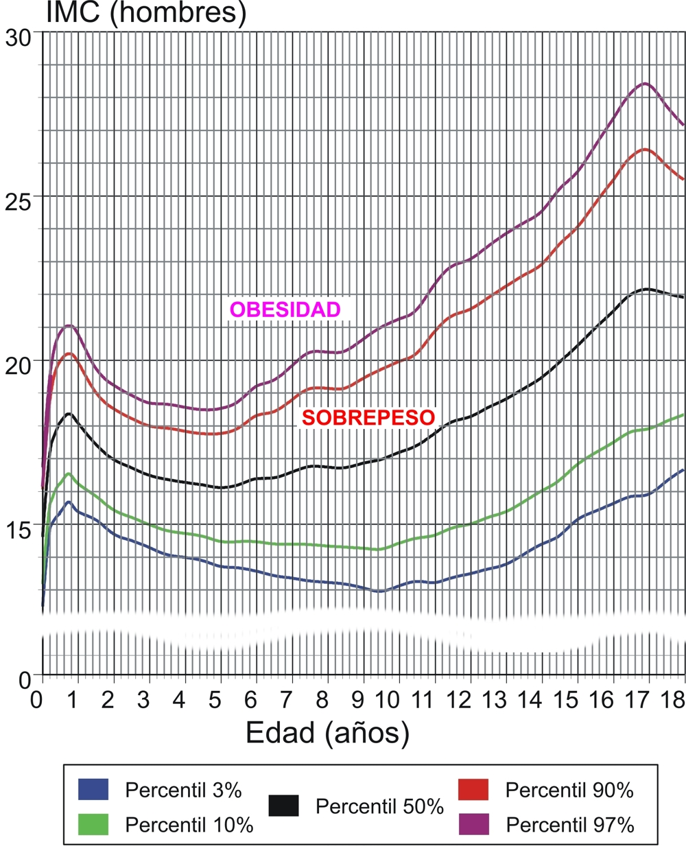 Índice de Masa Corporal en la población masculina española (0 a 18 años)